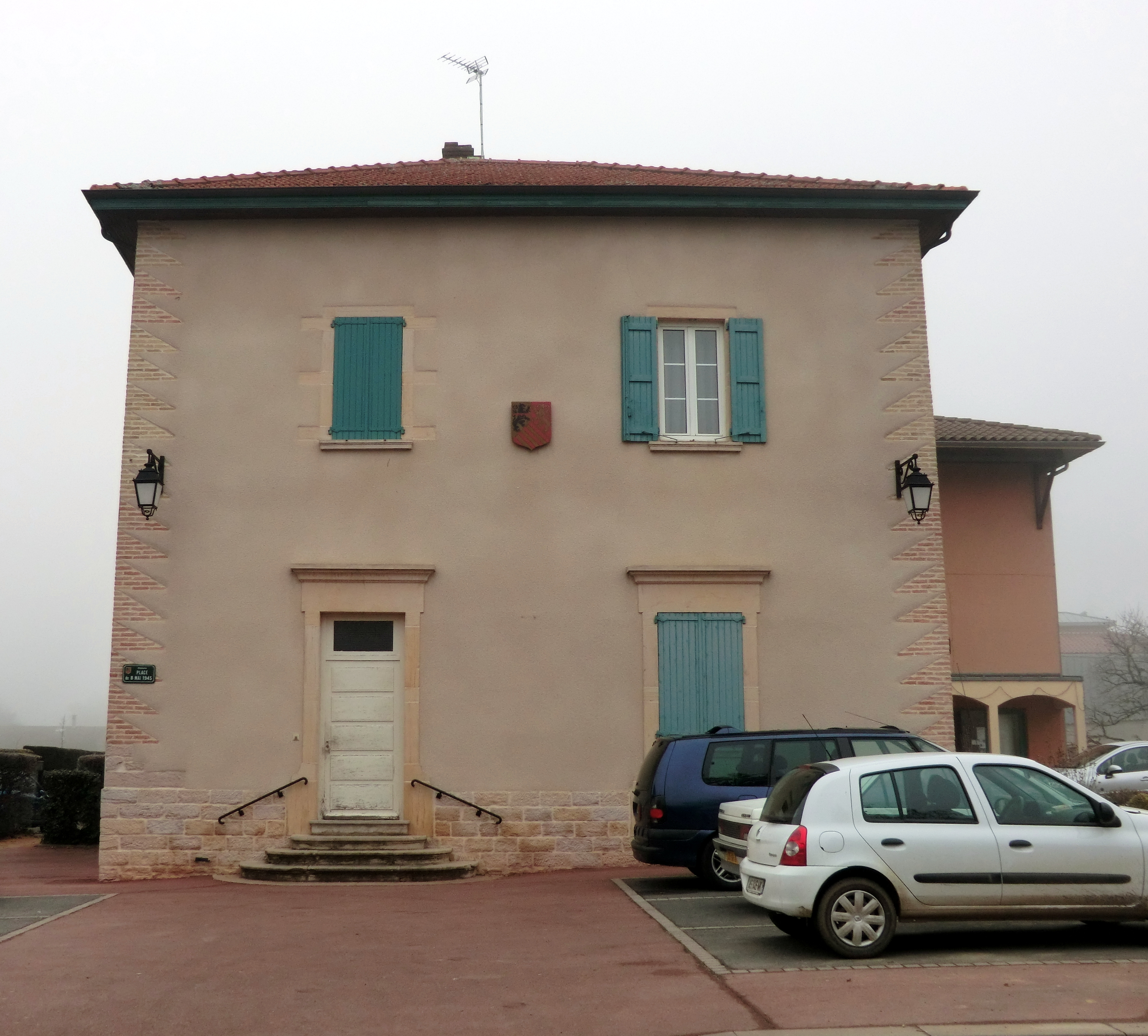 Mairie de Chaneins.